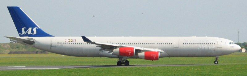 SK 0943 med kurs mod Chicago, USA